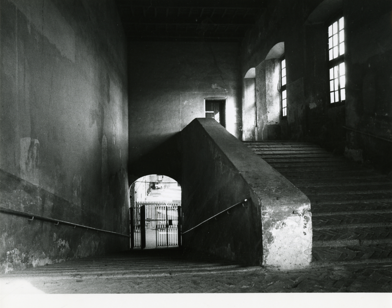 Servizio fotografico : Melegnano, 1980 / Paolo Monti. - Stampe: 2 : Positivo b/n, gelatina bromuro d'argento/ carta, 24x30. - ((Al verso delle stampe manoscritti i numeri dei negativi corrispondenti (formato 35 mm) con indicazione del fotogramma: 3561/30, 3561/31. - Timbro a inchiostro con copyright: "© Copyright/ Credit to/ Paolo Monti/ Corso Sempione [...]/ Milano". - Sul coperchio della scatola iscrizione didascalica manoscritta a pennarello nero: "Architettura/ Castelli". - Occasione: Documentazione per la pubblicazione: Vincenti Antonello, "Castelli viscontei e sforzeschi", Milano, Rusconi immagini, 1981. - Fonte: Agenda di Paolo Monti: Nikon Leika 3001-/ Monti 1978 (1978-1982), presso Archivio Paolo Monti. - Fonte: Monografia di Vincenti, Antonello: Castelli viscontei e sforzeschi, Milano, Rusconi immagini (1981)